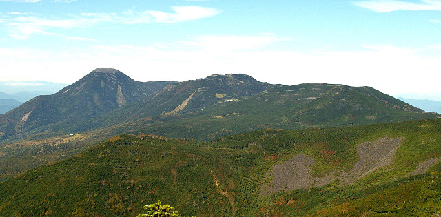 北八ヶ岳 (長野県, 右手前から縞枯山・横岳・蓼科山, 天狗岳中腹から撮影)Kita-Yatsugatake (Mt. Shibagare, Mt. Yokodake, Mt. Tateshina, Nagano, JAPAN)